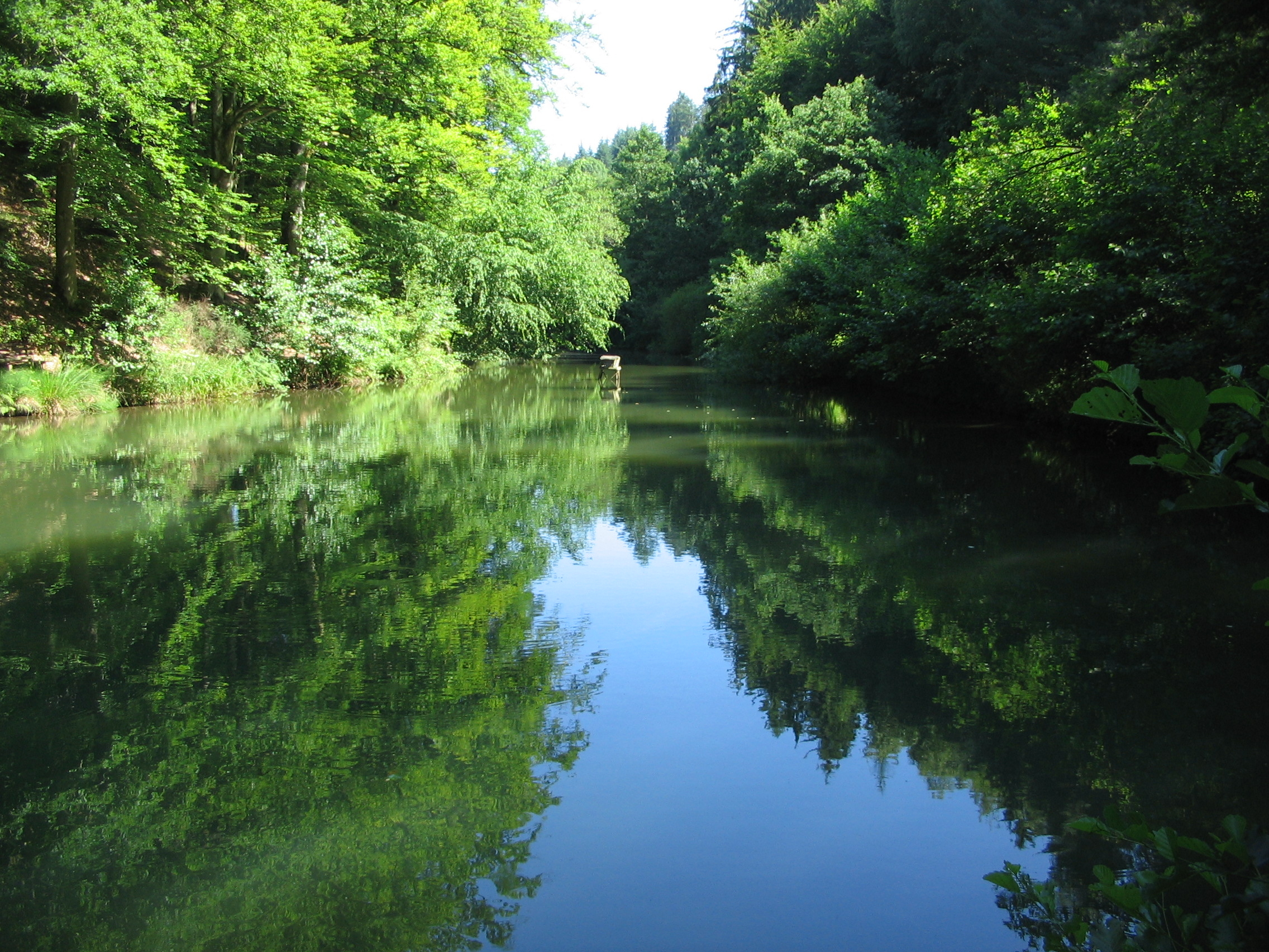 Der obere der beiden künstlichen Seen im Dreiseetal am Erdbach bei Dorf-Erbach im Odenwald